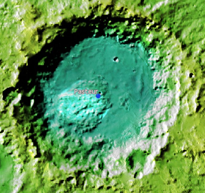 Cráter marciano Pasteur. (Imagen IAU/USGS/Goddard/A SU/USGS)